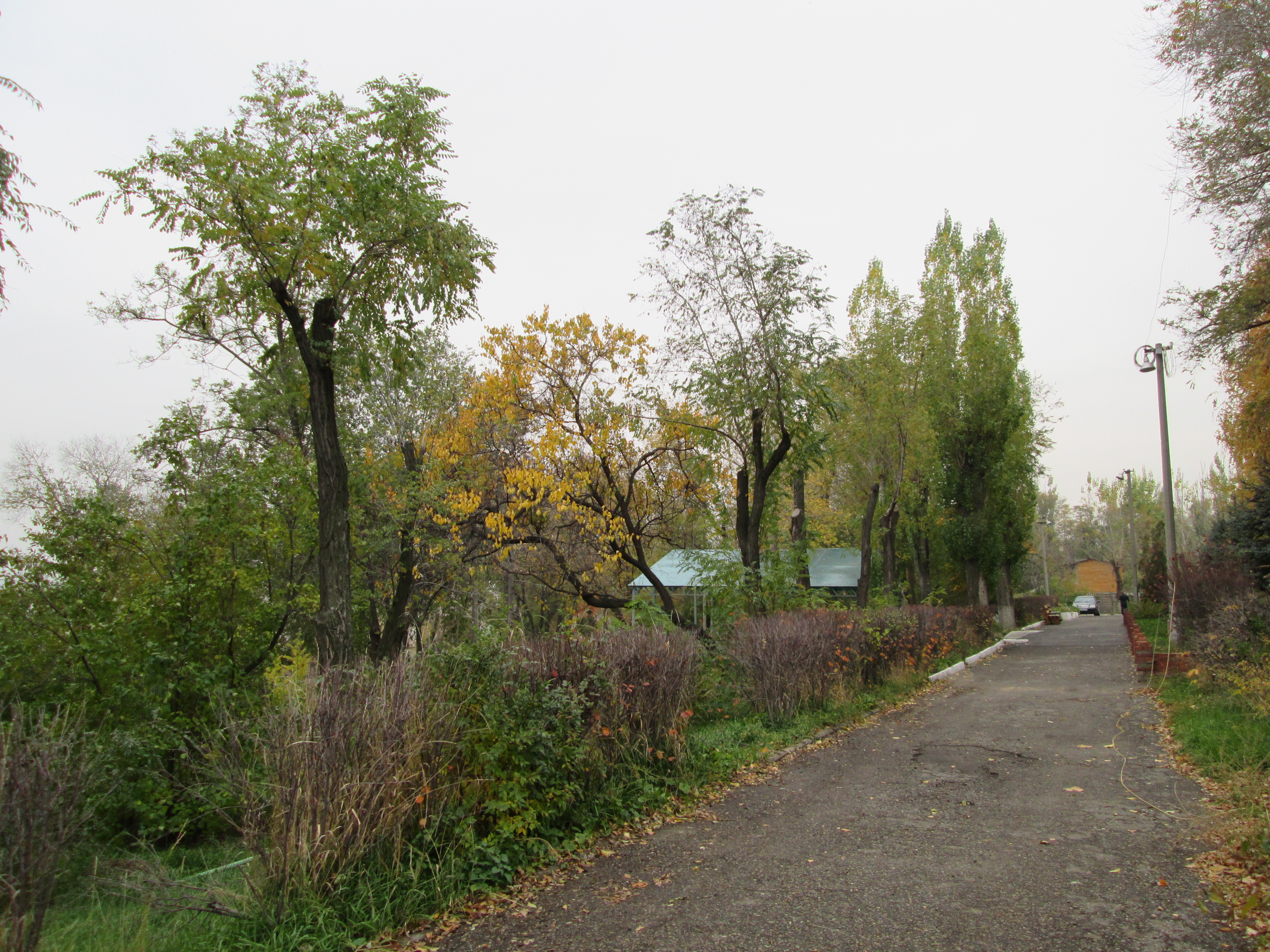 Место, где размещался командный пункт 124-й отдельной стрелковой бригады и группы войск полковника Горохова С.Ф.